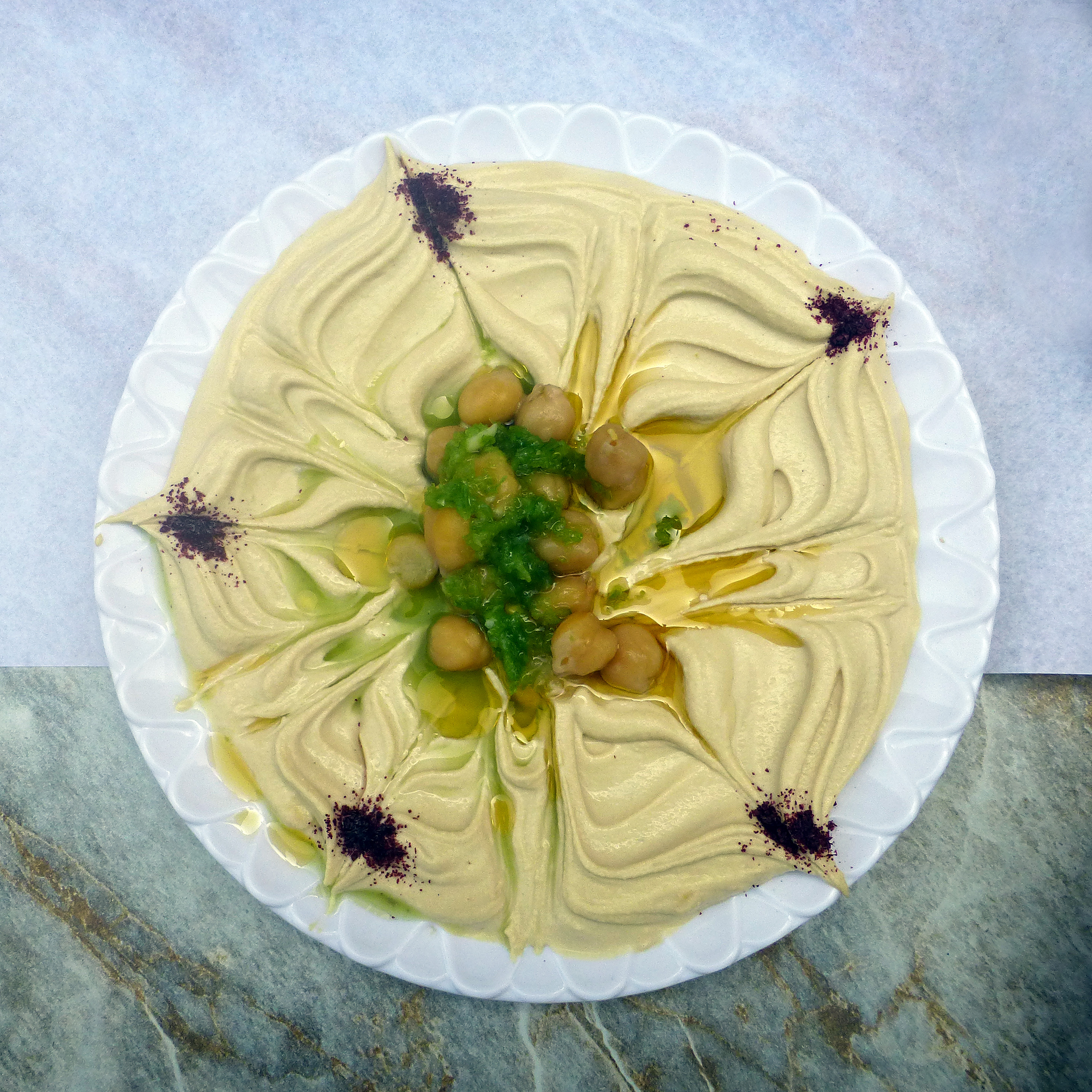 Houmous servi à Aqaba (Jordanie).